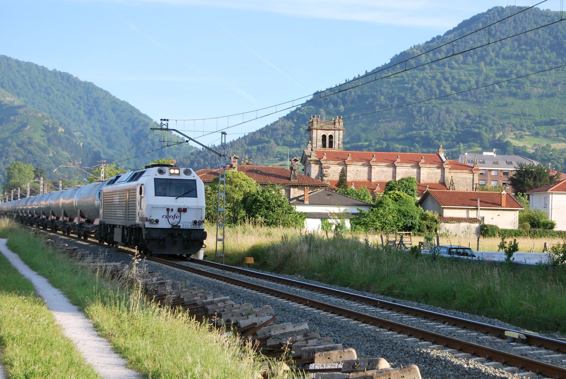 Tren de cisternas de Renfe en Los Corrales de Buena (Cantabria, España).